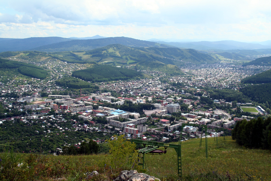 Pohled na město Gorno-Altajsk; v popředí lyžařský vlek (datum: srpen 2006, autor: Vít Hněvkovský) View of Gorno-Altaysk; in front is ski-lift (date: August 2006, author: Vít Hněvkovský, CZ)